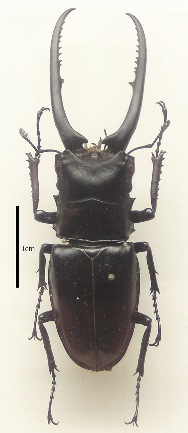 Cladognatha confucius (Lucanidae), mounted specimen from China.